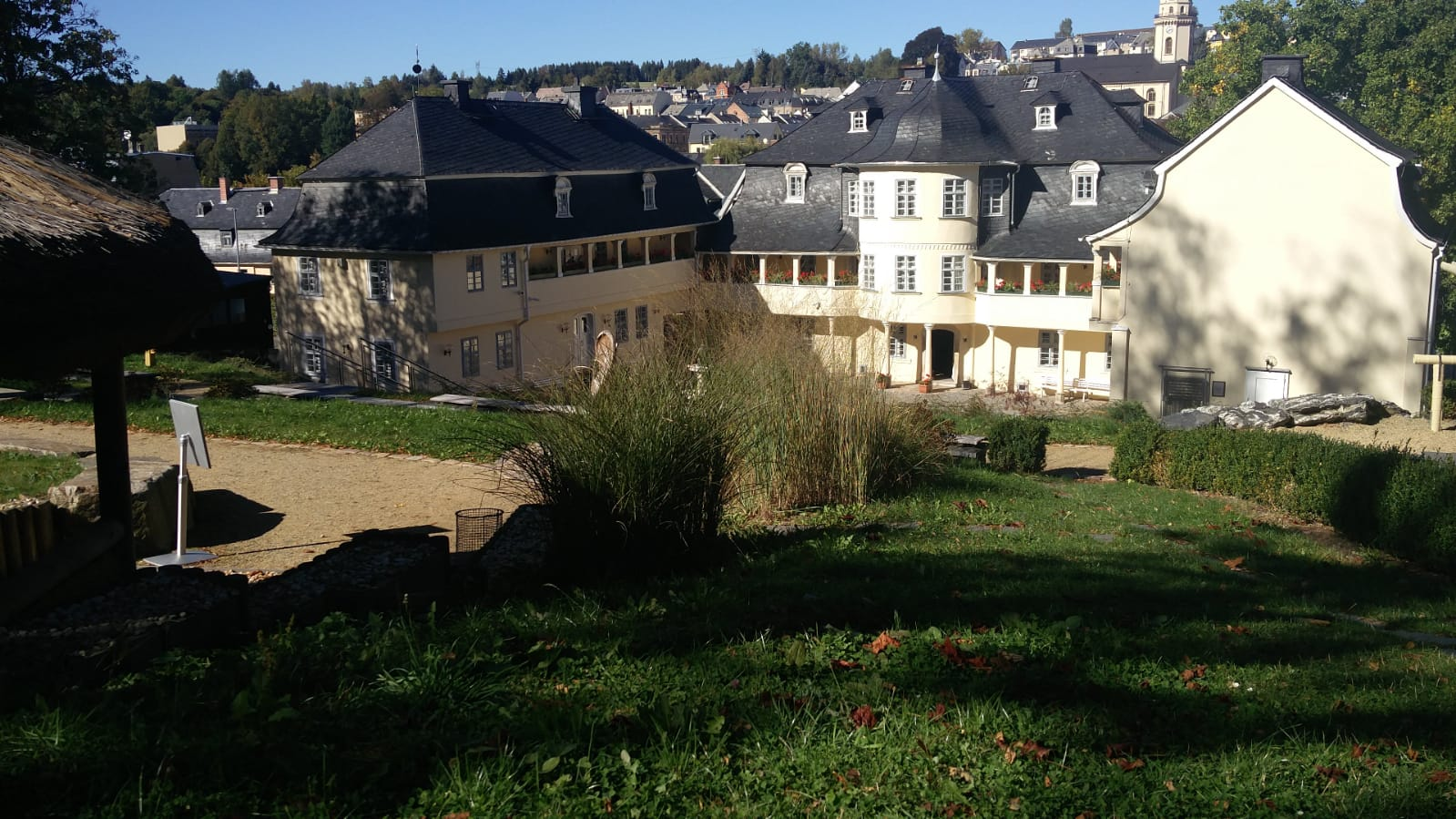 Musikinstrumentenmuseum Markneukirchen mit Klanggarten, Blick von der Klangtreppe auf das Paulusschlössl